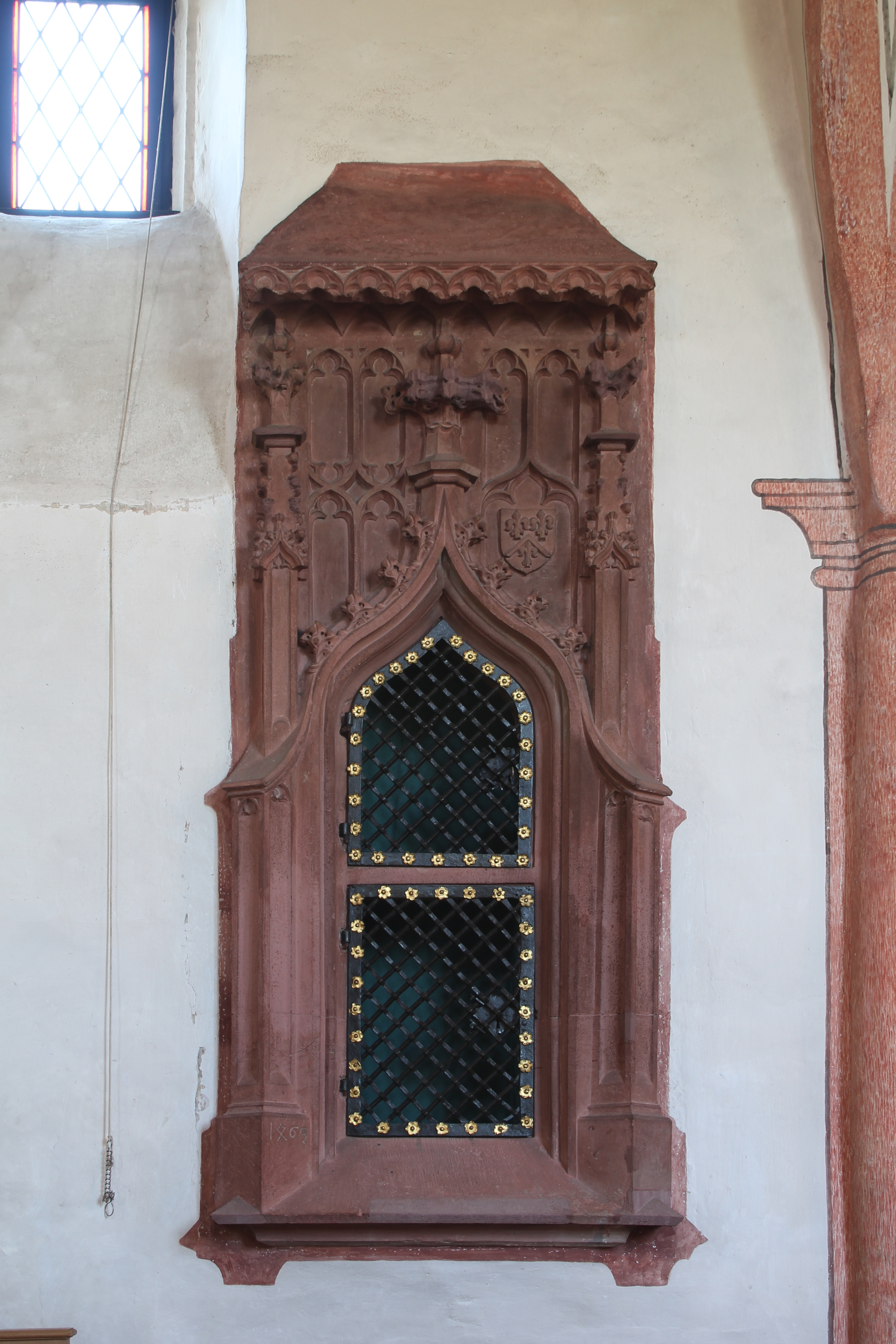 Wandtabernakel von 1463; rechts oberhalb der Mitte ein Wappen mit drei Lilien